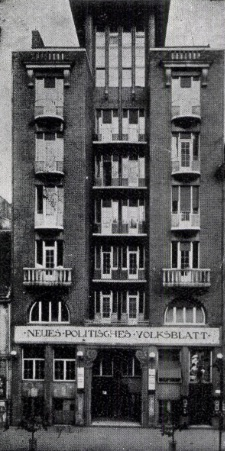 Újságház, Nagymező utca 3. Tervezték: Gyenes Lajos és Vajda Andor, 1913-1914